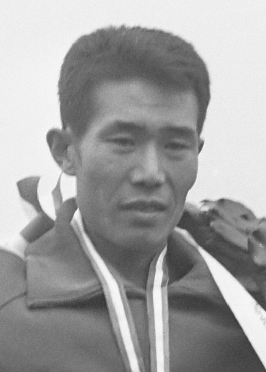 12e Internationale Marathon, Enschede; Matsubara met krans 16 augustus 1969